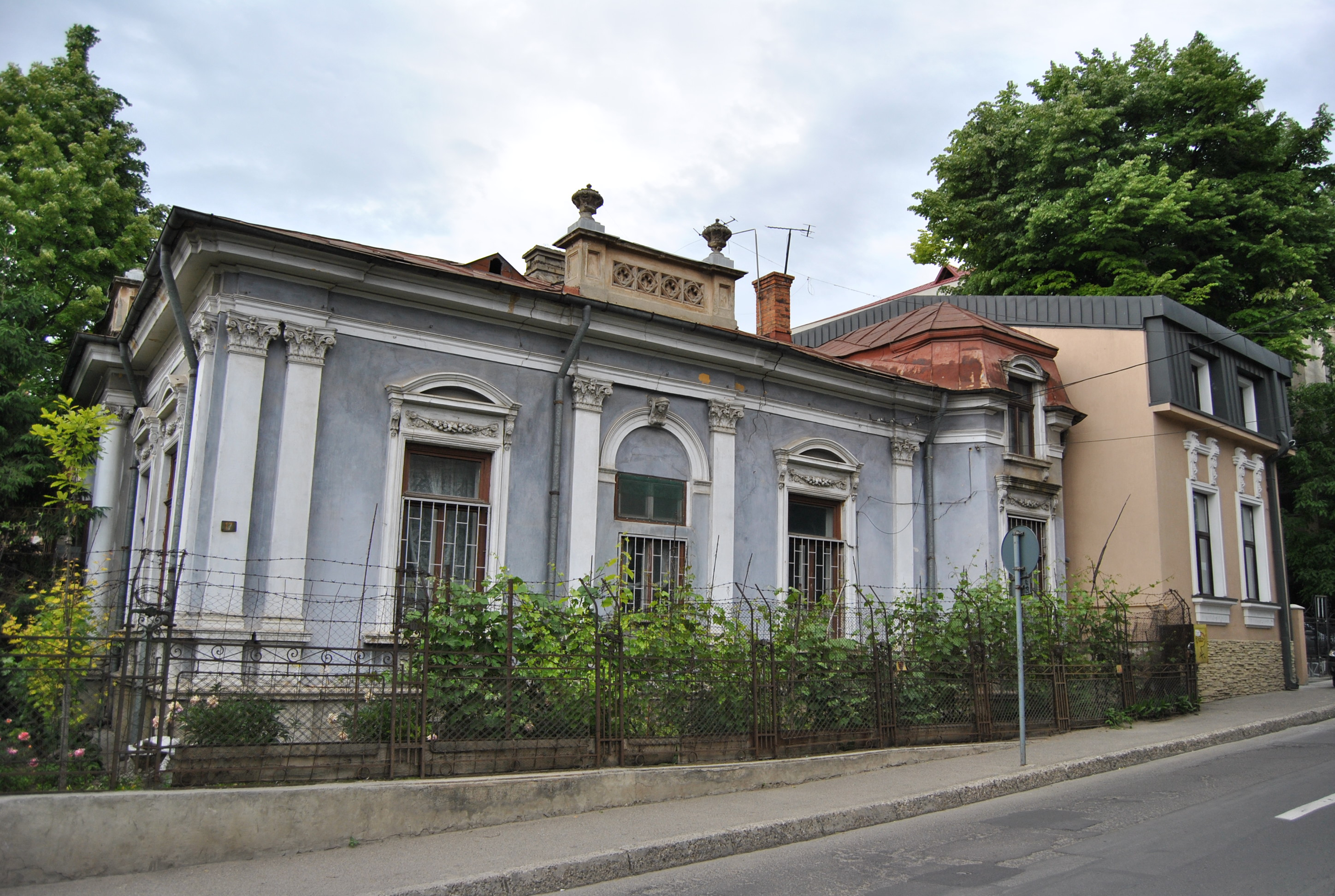 Casă - str. Sf. Sava, nr.17